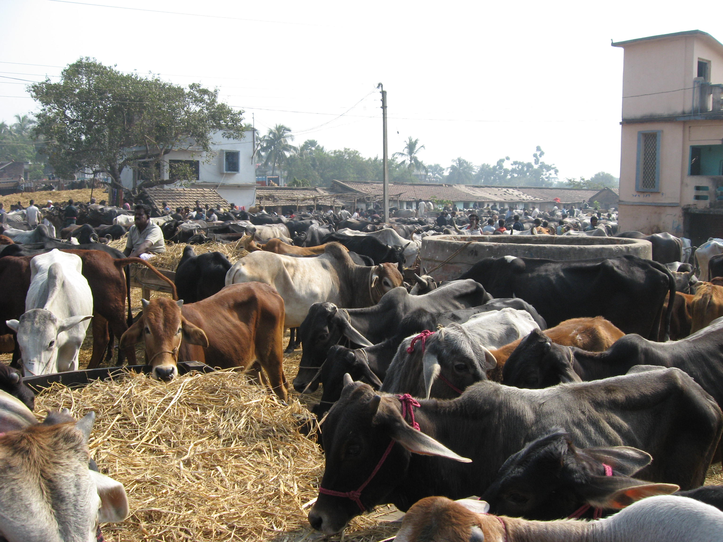 Pandua Cattle Market